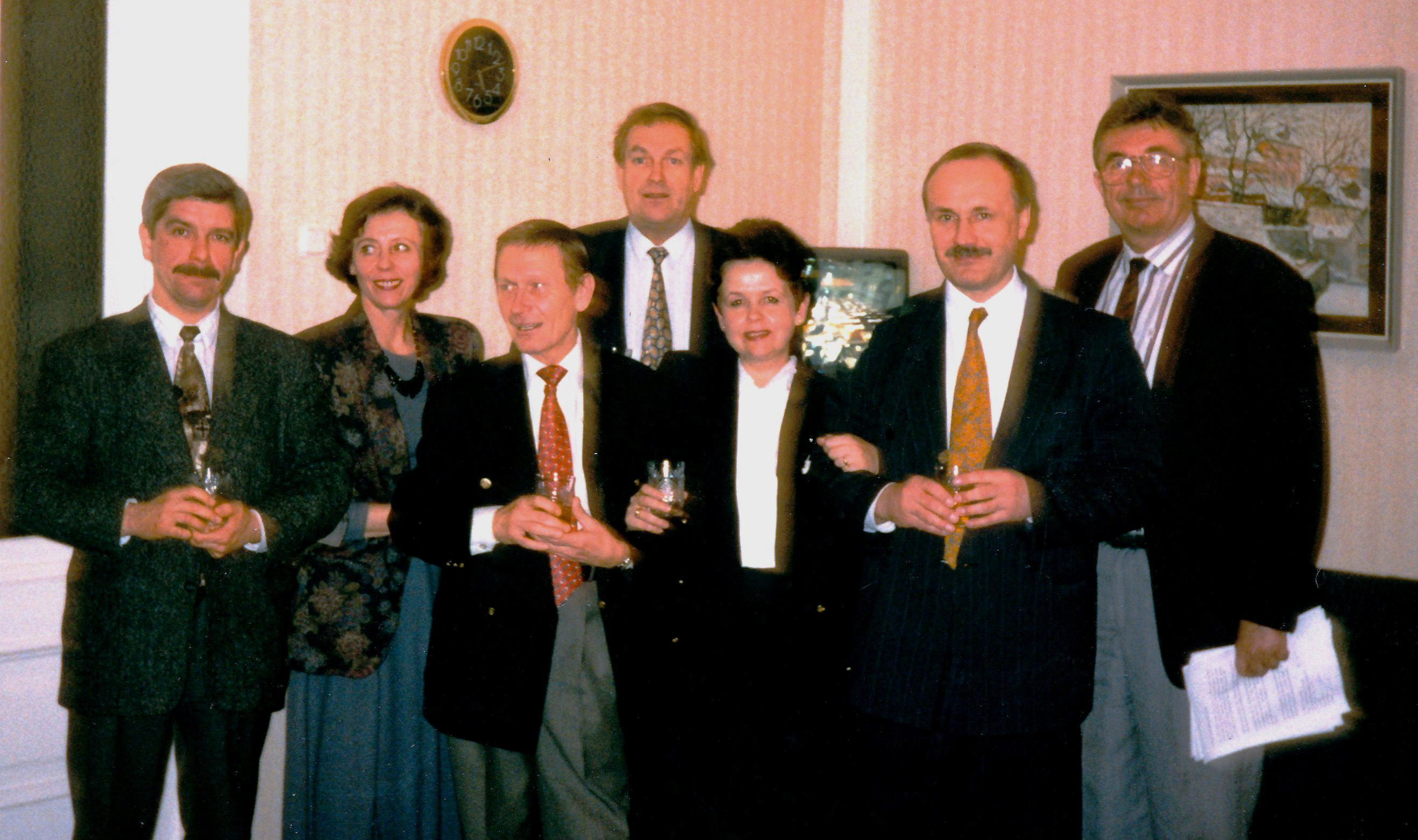 Riigikogu liberaal-tsentristlik fraktsioon. Vasakult Tõnu Kõrda, Krista Kilvet, Priit Aimla, Tiit Made, Andra Veidemann, Arvo Junti, Rein Karemäe.